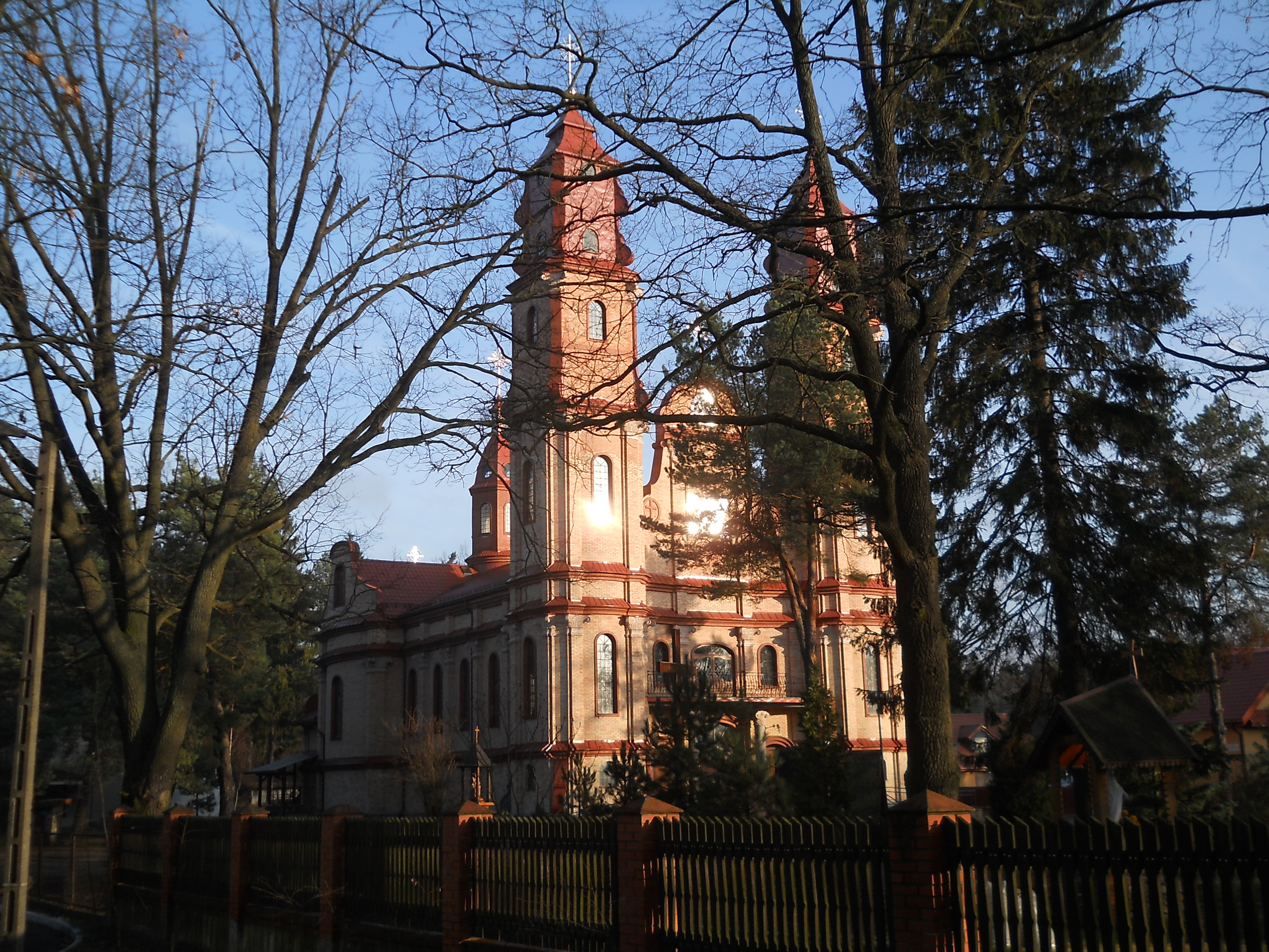 Kościół parafialny Świętych Cyryla i Metodego